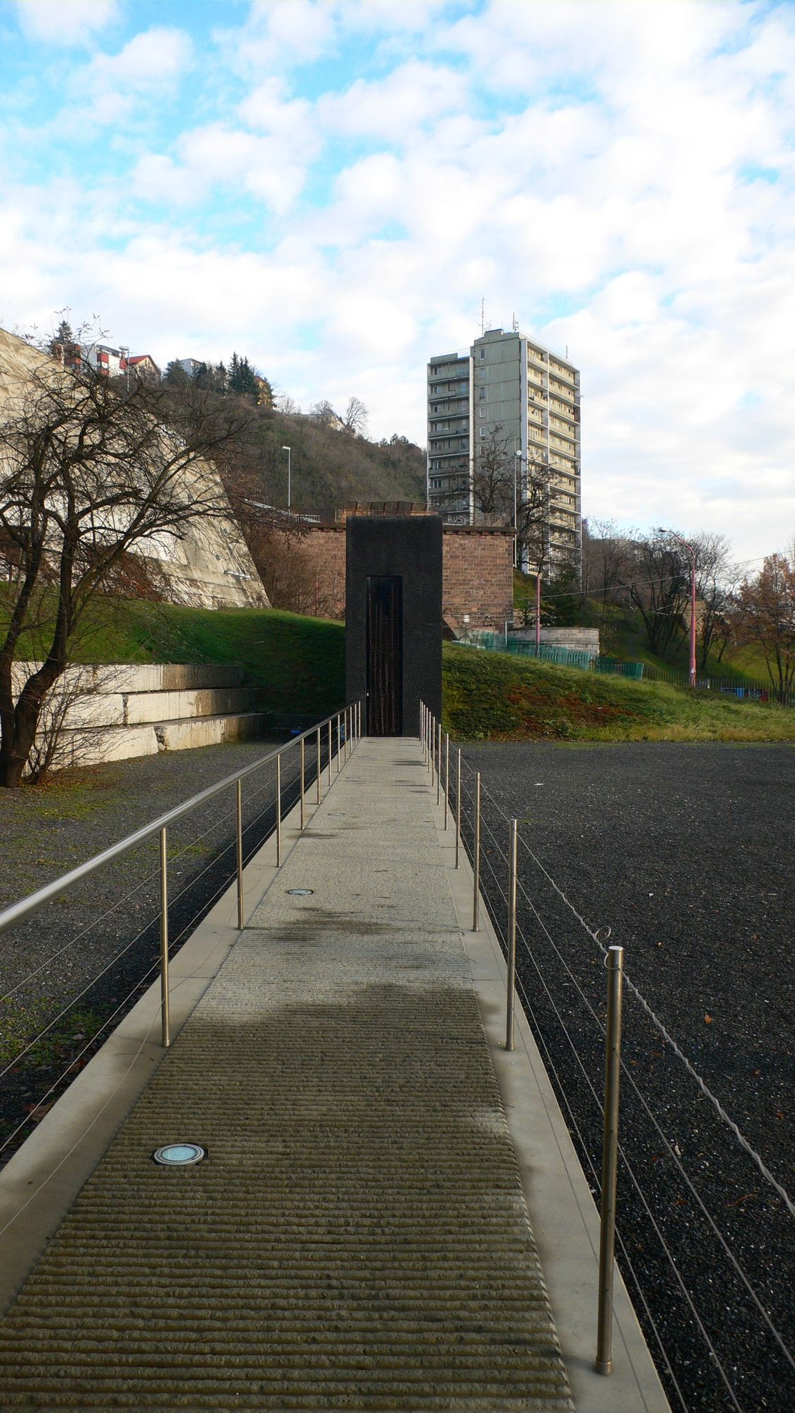 Mauzóleum Chatama Sófera